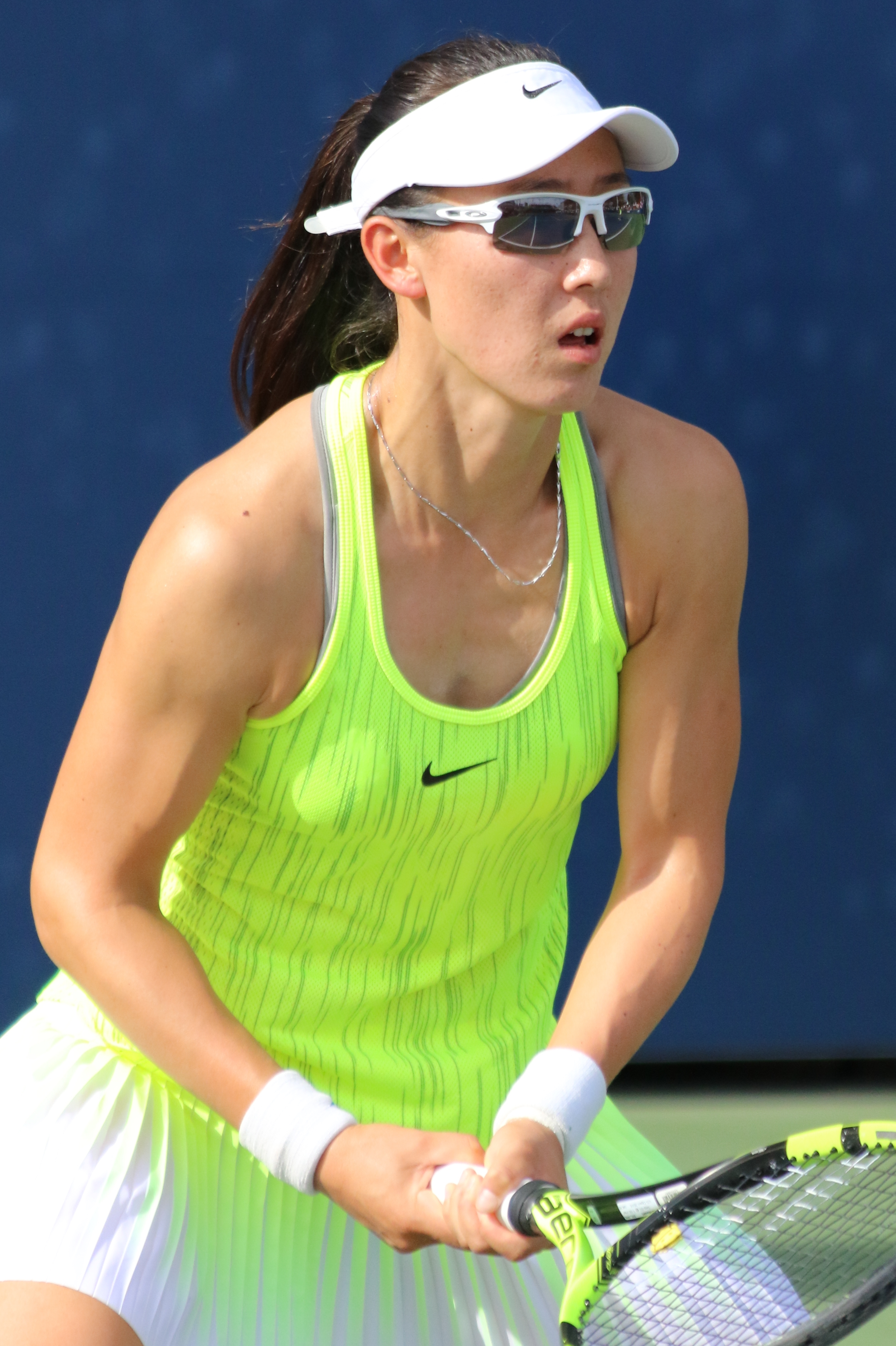 Zheng S. US16 (28)